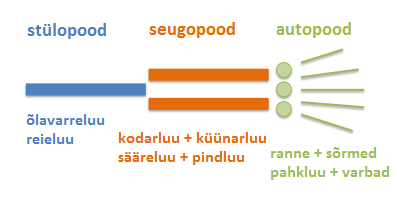 Jäse koosneb kolmest osast (lugedes proksimaalsest distaalsema poole): stülopood, seugopood ja autopood.